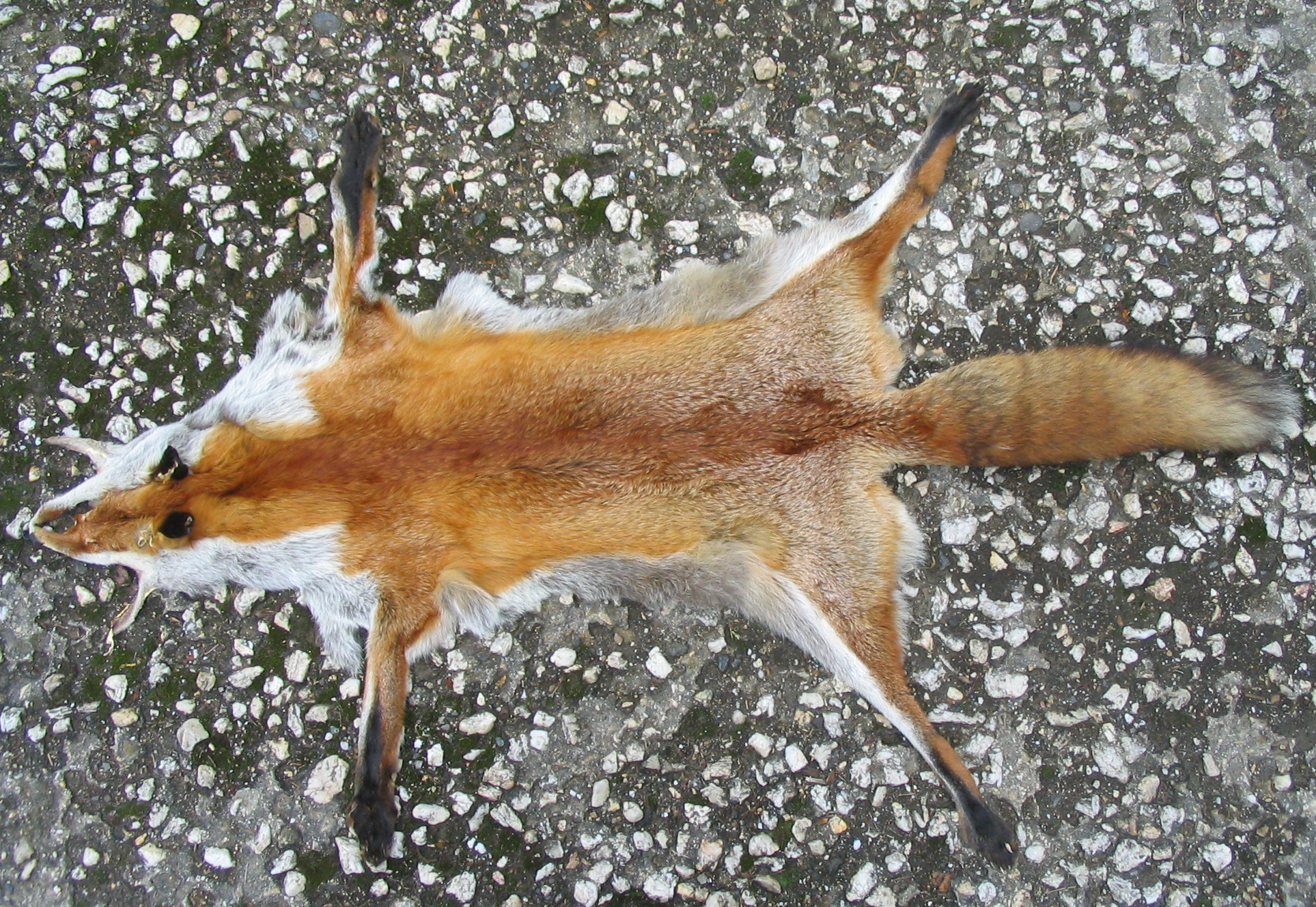 Rotfuchsfell, Provenienz südlicher Westerwald. Erlegt von Karl Friedrich Herhold im Oktober, ca. 1992.